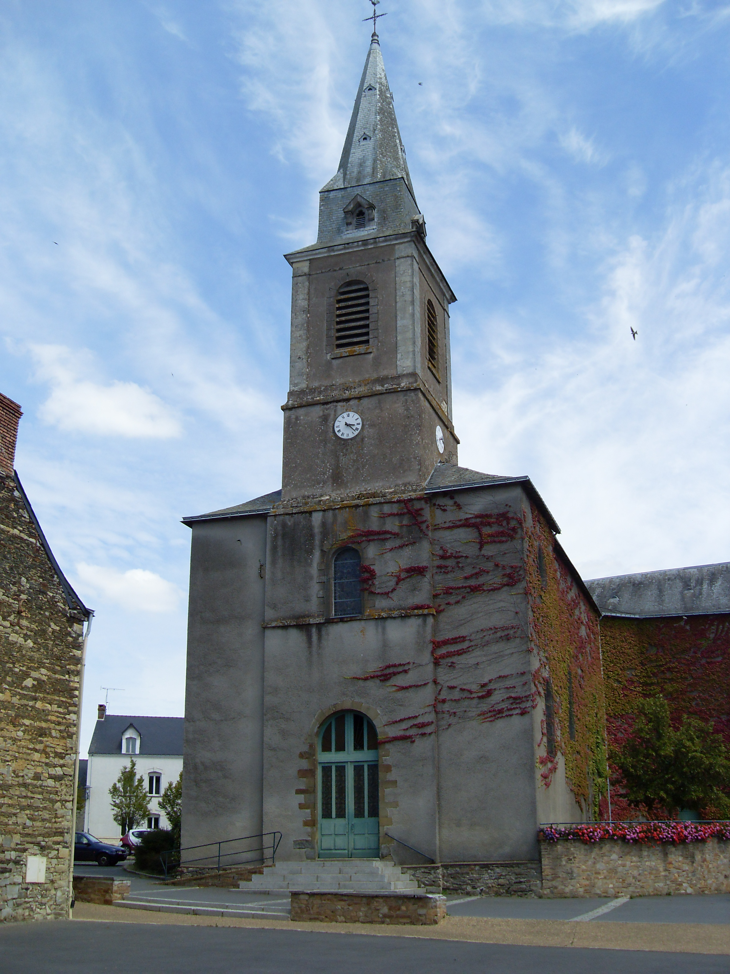 église de Sion-les-Mines